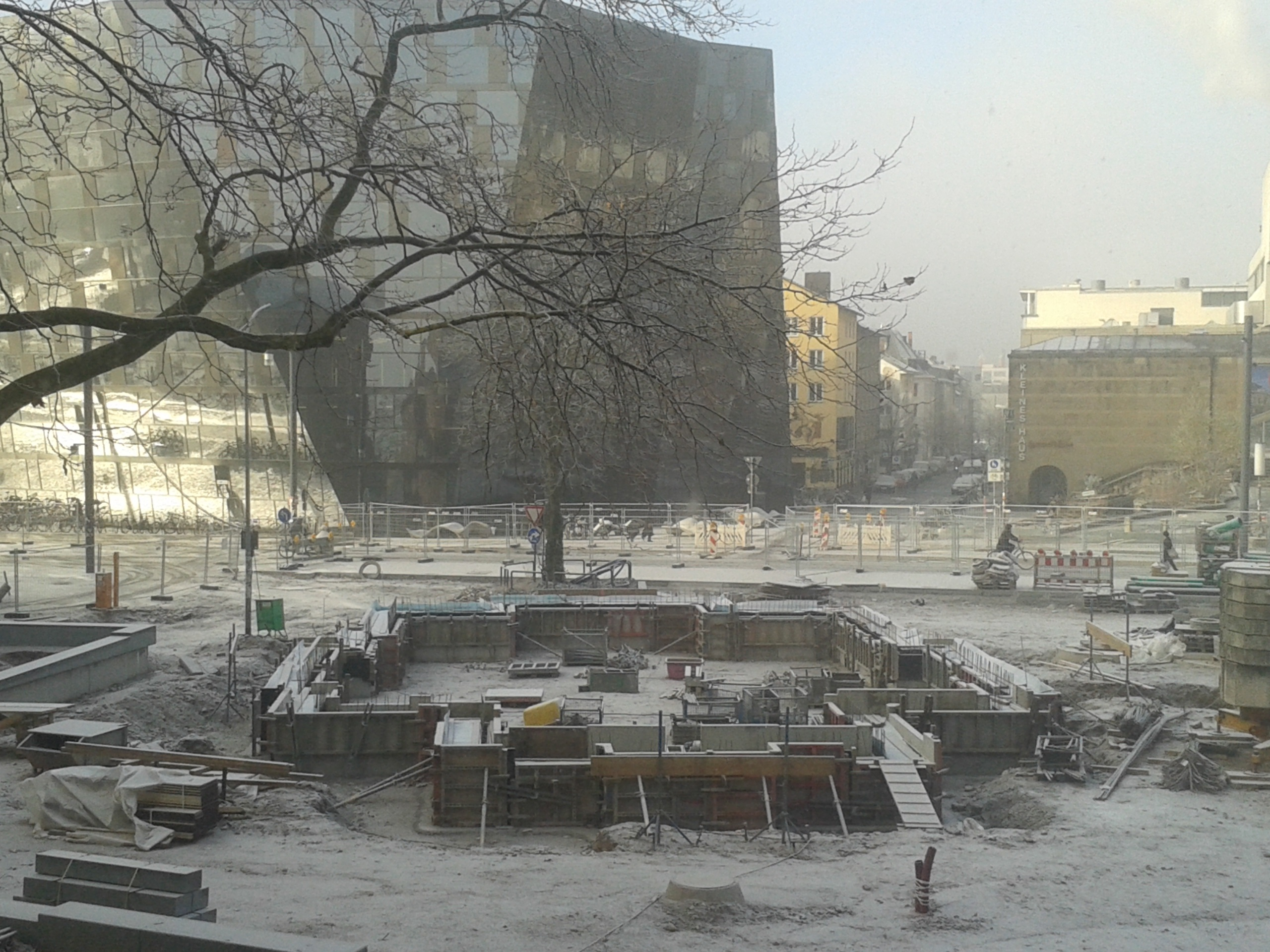 Das Synagogen-Areal Ende 2016.